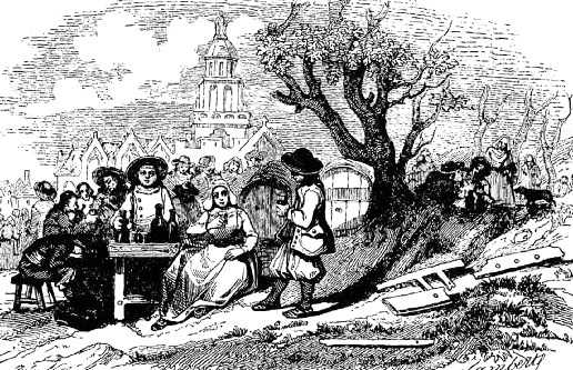 Le Faou (dessin de 1844, publié dans "La Bretagne" par Jules Janin